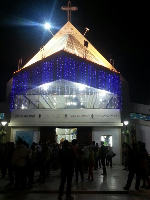 Catedral durante las misas de aguinaldo